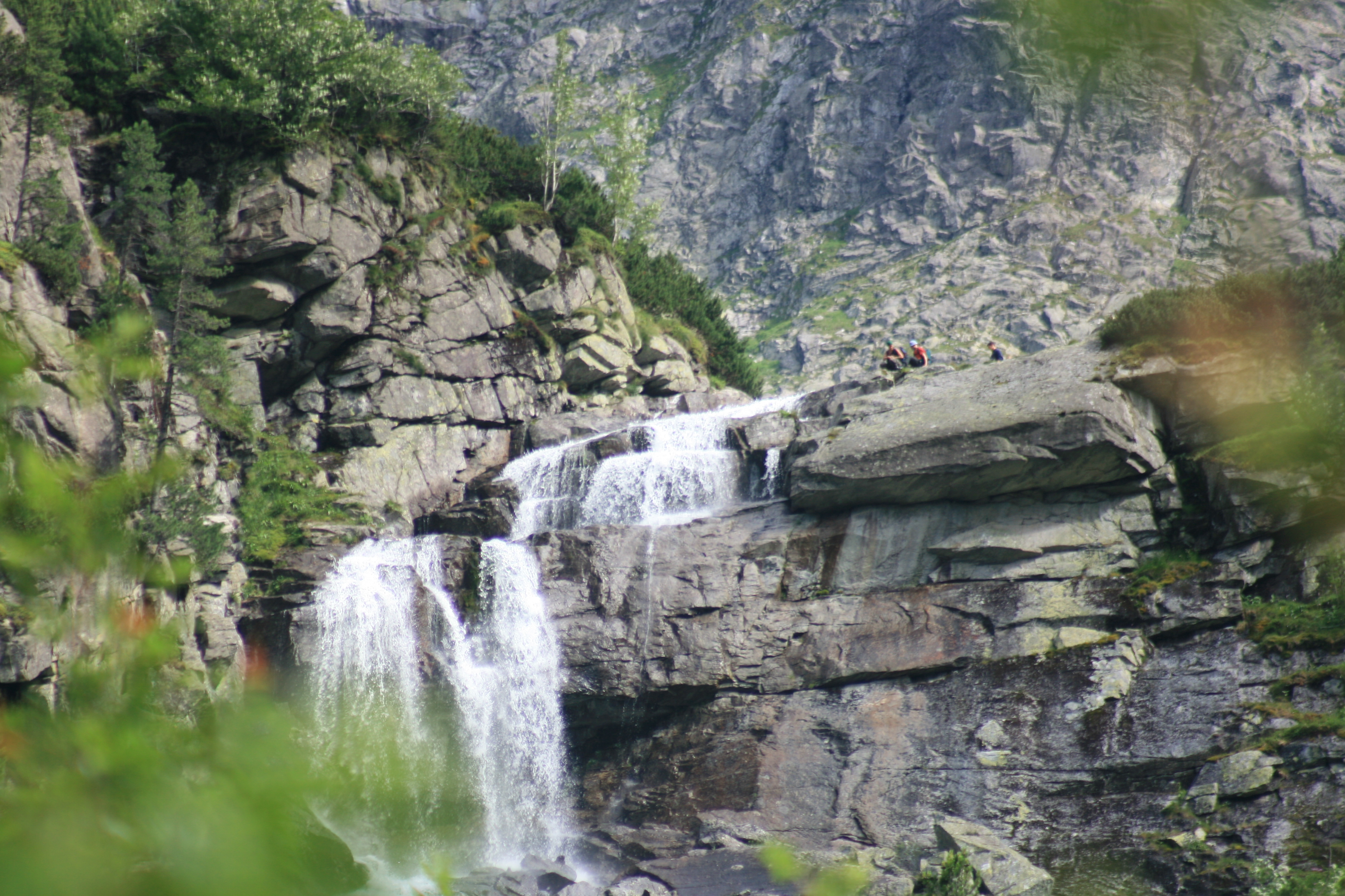 Czarnostawianska siklawa